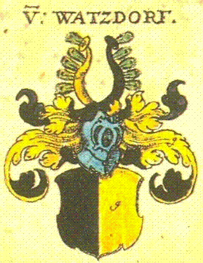 Wappen der Familie von Watzdorf nach Siebmachers Wappenbuch